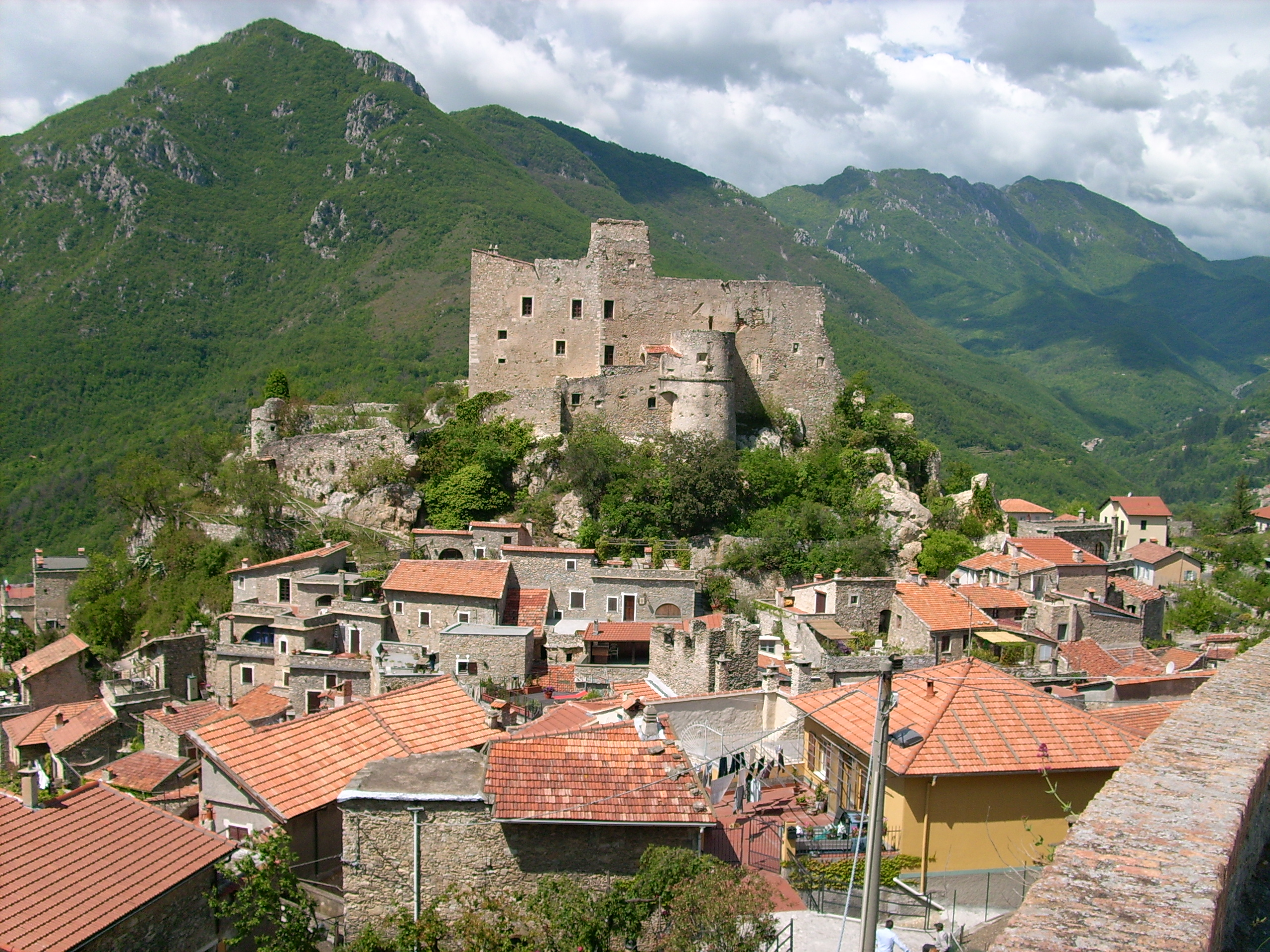 Castelvecchio di Rocca Barbena, Liguria, Italia